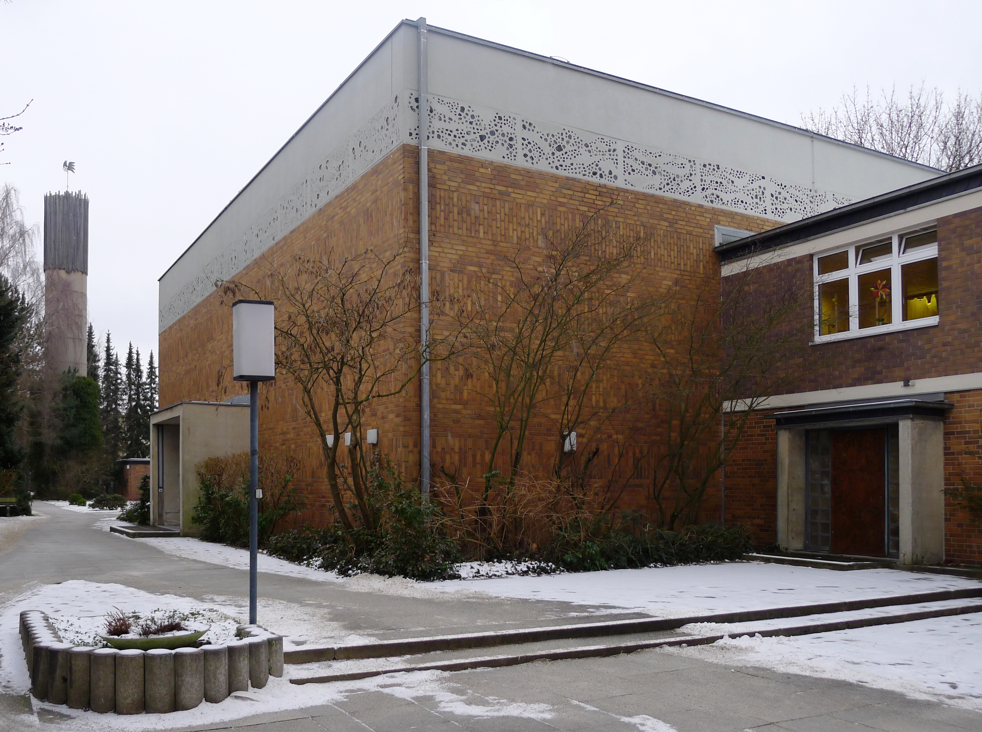 Kirchegebäude mit Campanile im Hintergrund